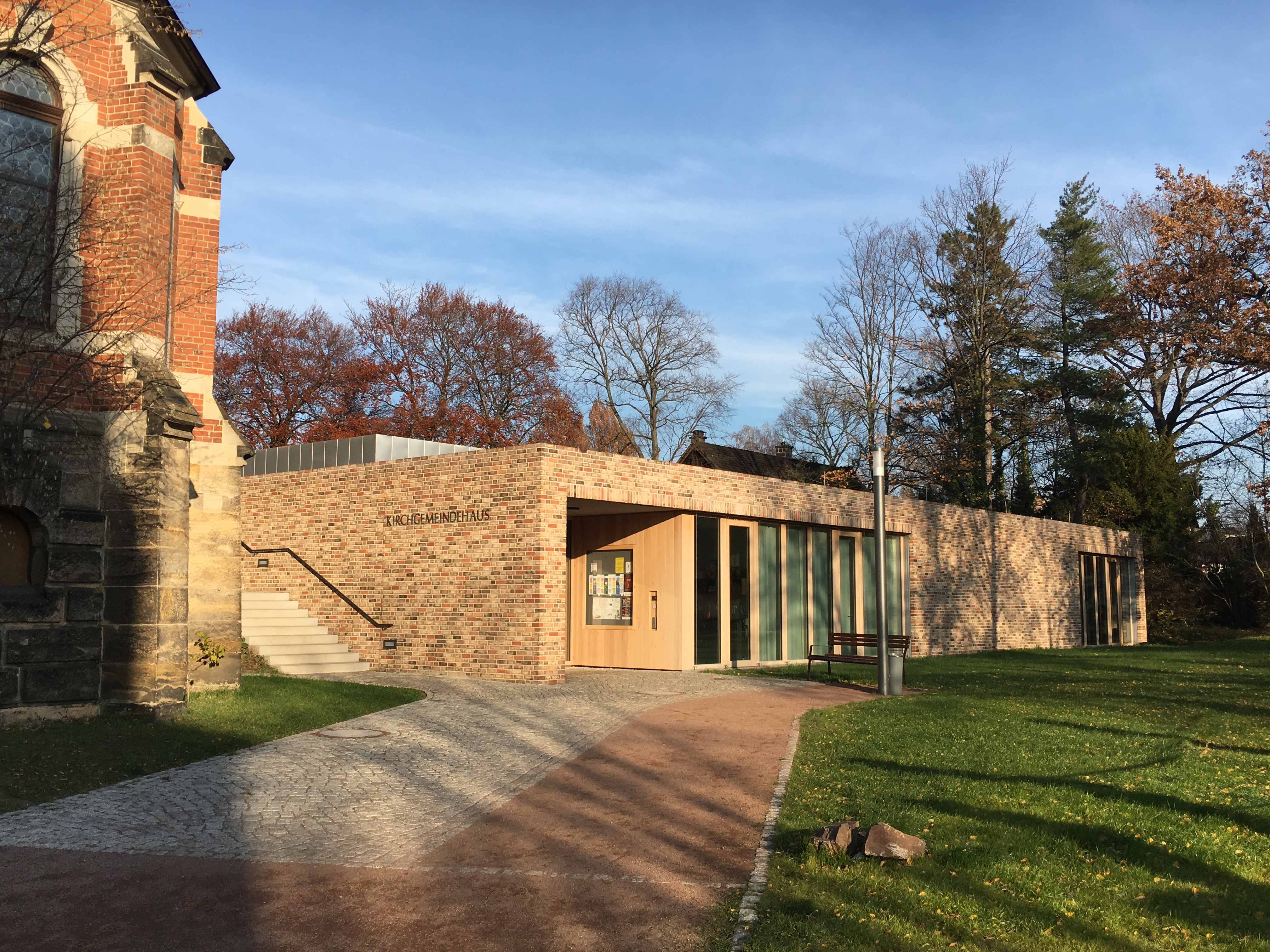 Radebeul Neues Gemeindehaus der Lutherkirche